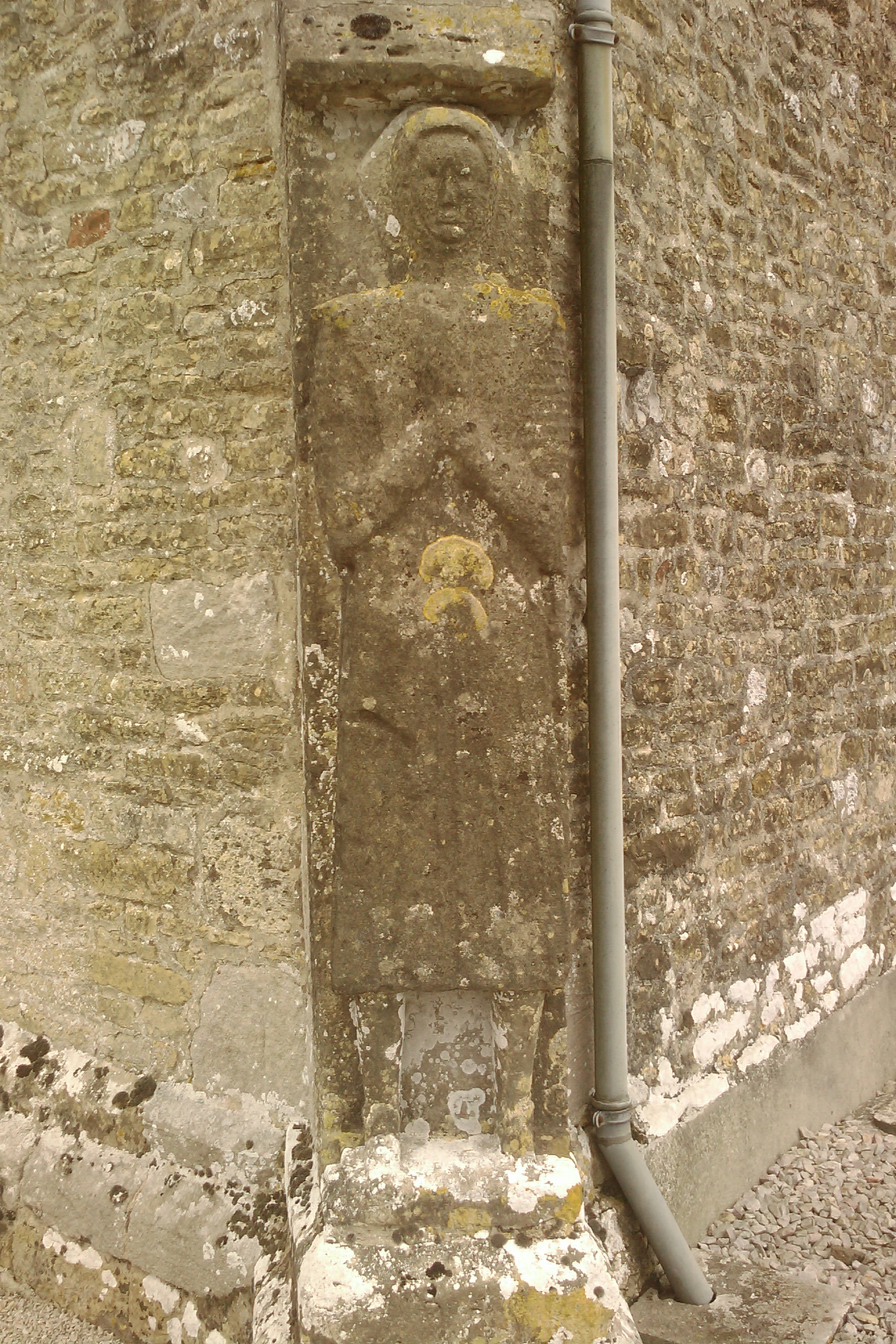 Église Saint-Vigor de Joganville - gisant debout du XIIe représentant un chevalier